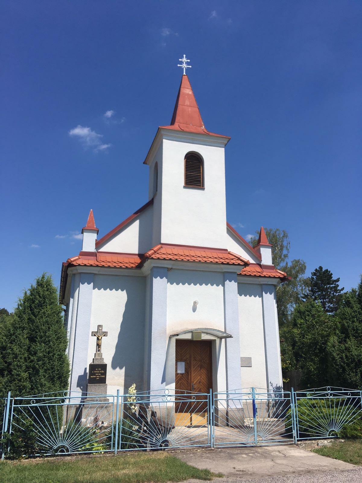 Kostol na Tomkoch